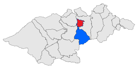 Mapa de l'antiga comuna de Palaldà, feta a partir d'un mapa de lliure disposició